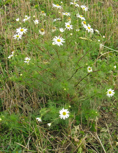 Bekvapis šunramunis (Tripleurospermum perforatum) Foto: Algirdas, 2005 m. lapkričio 5 d.